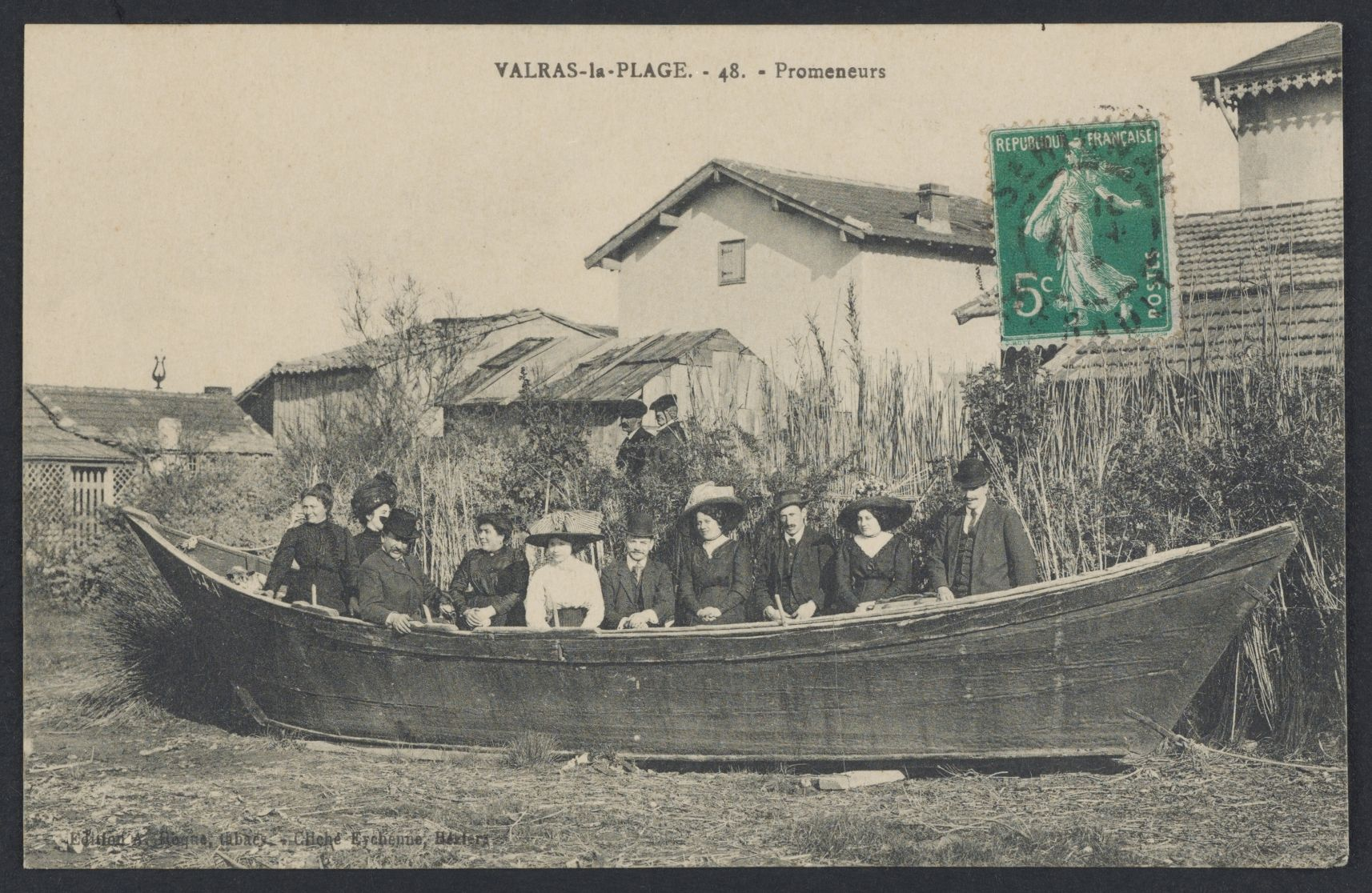 Valras-Plage. - Promeneurs : carte postale.